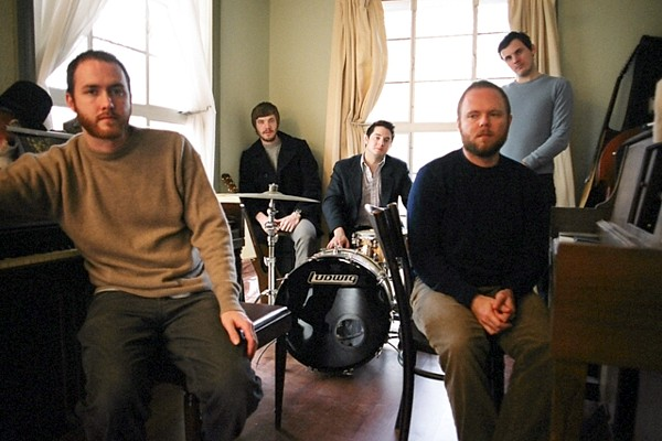 Midlake